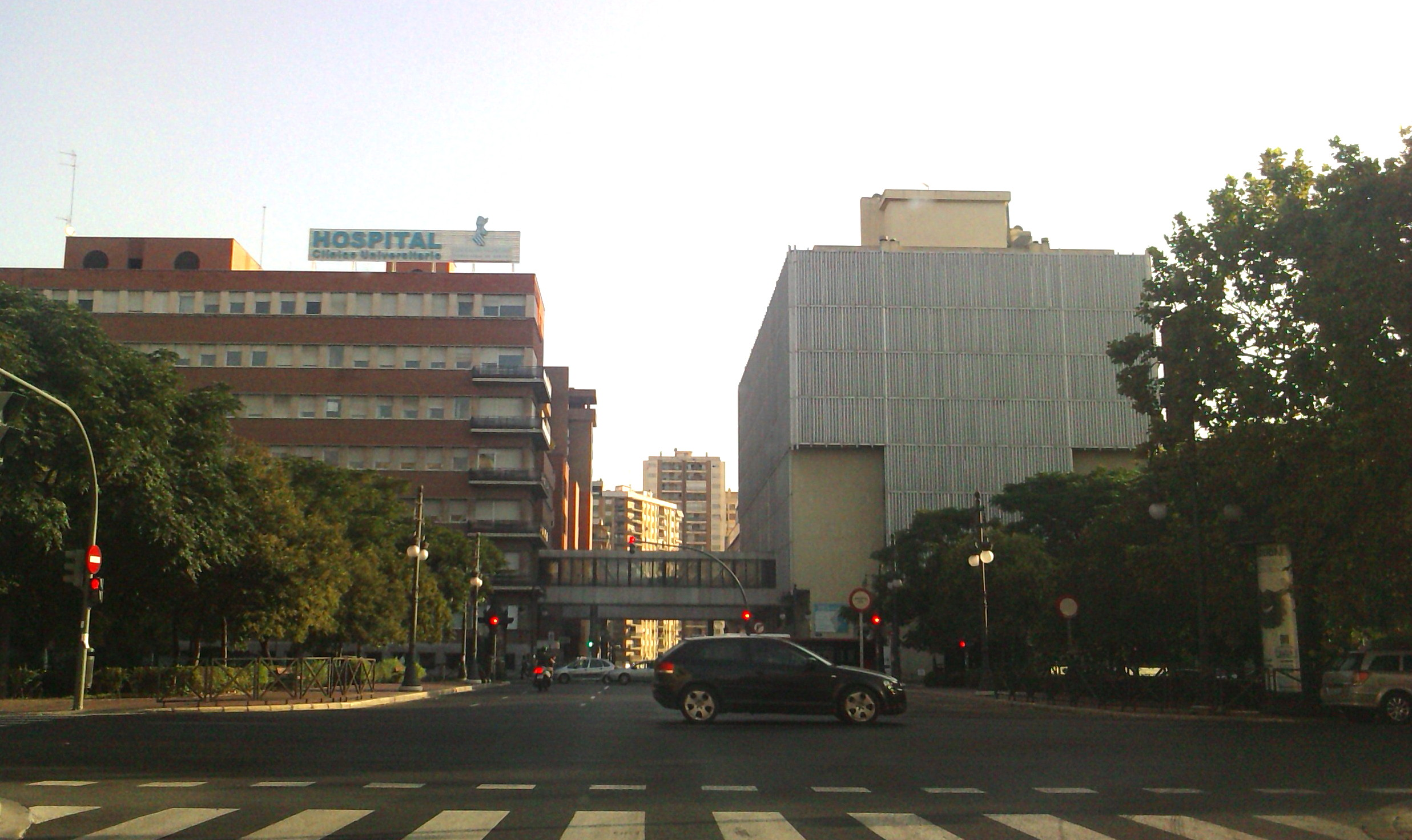 Fachada Sur del Hospital Clínico de Valencia, en la avenida Blasco Ibáñez.